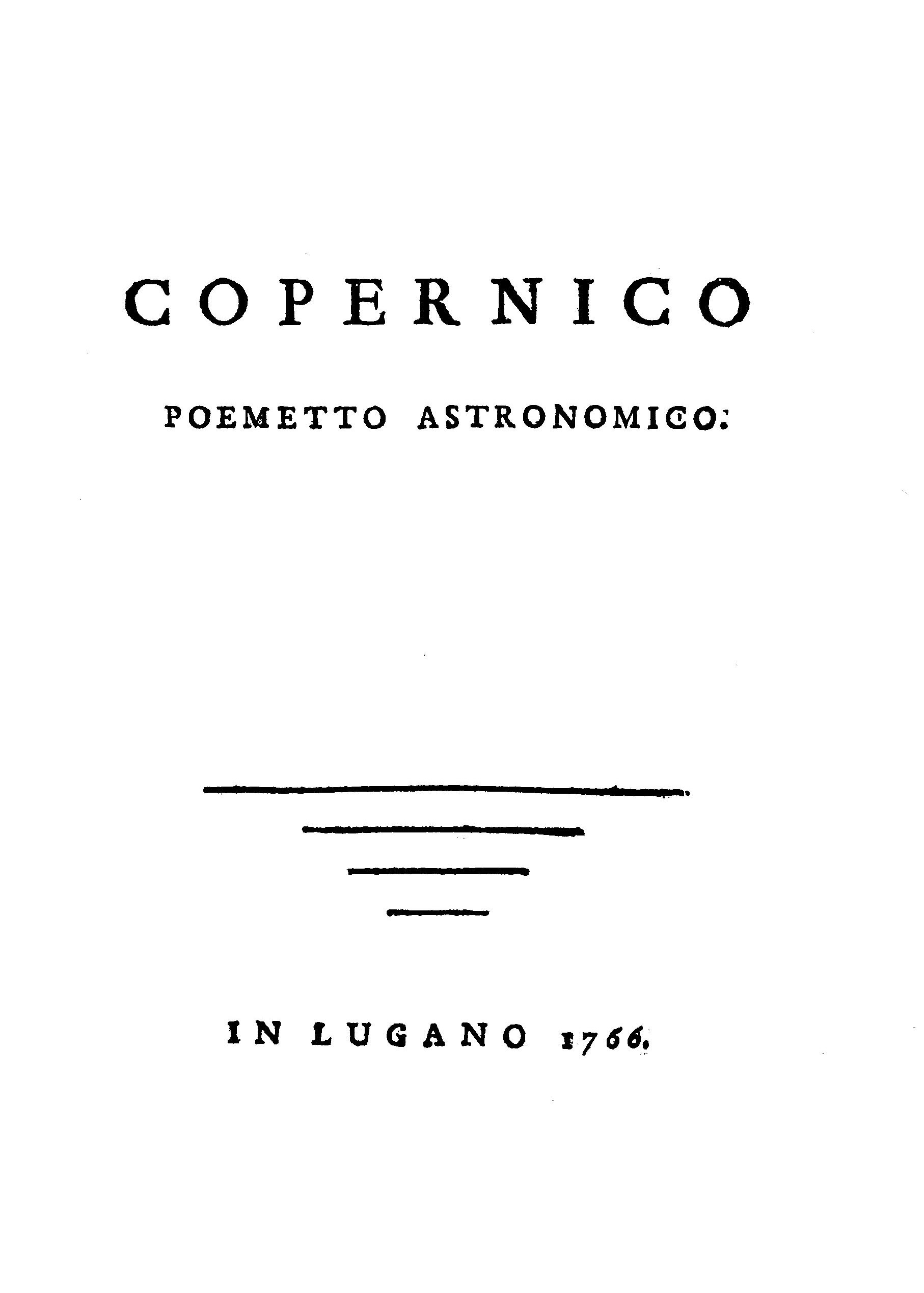 Frontespizio